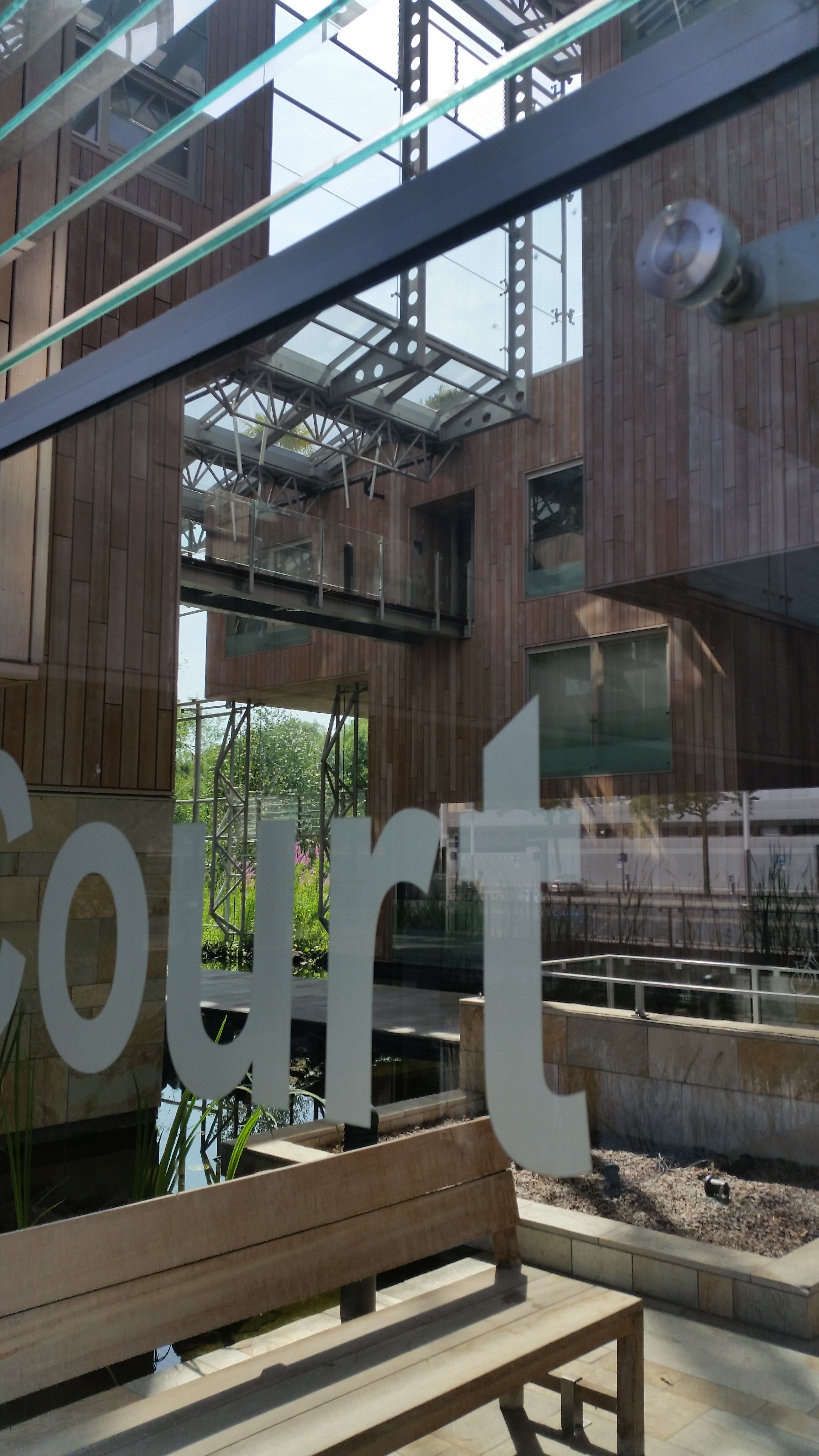 Crystal Court, Amsterdam, doorkijk